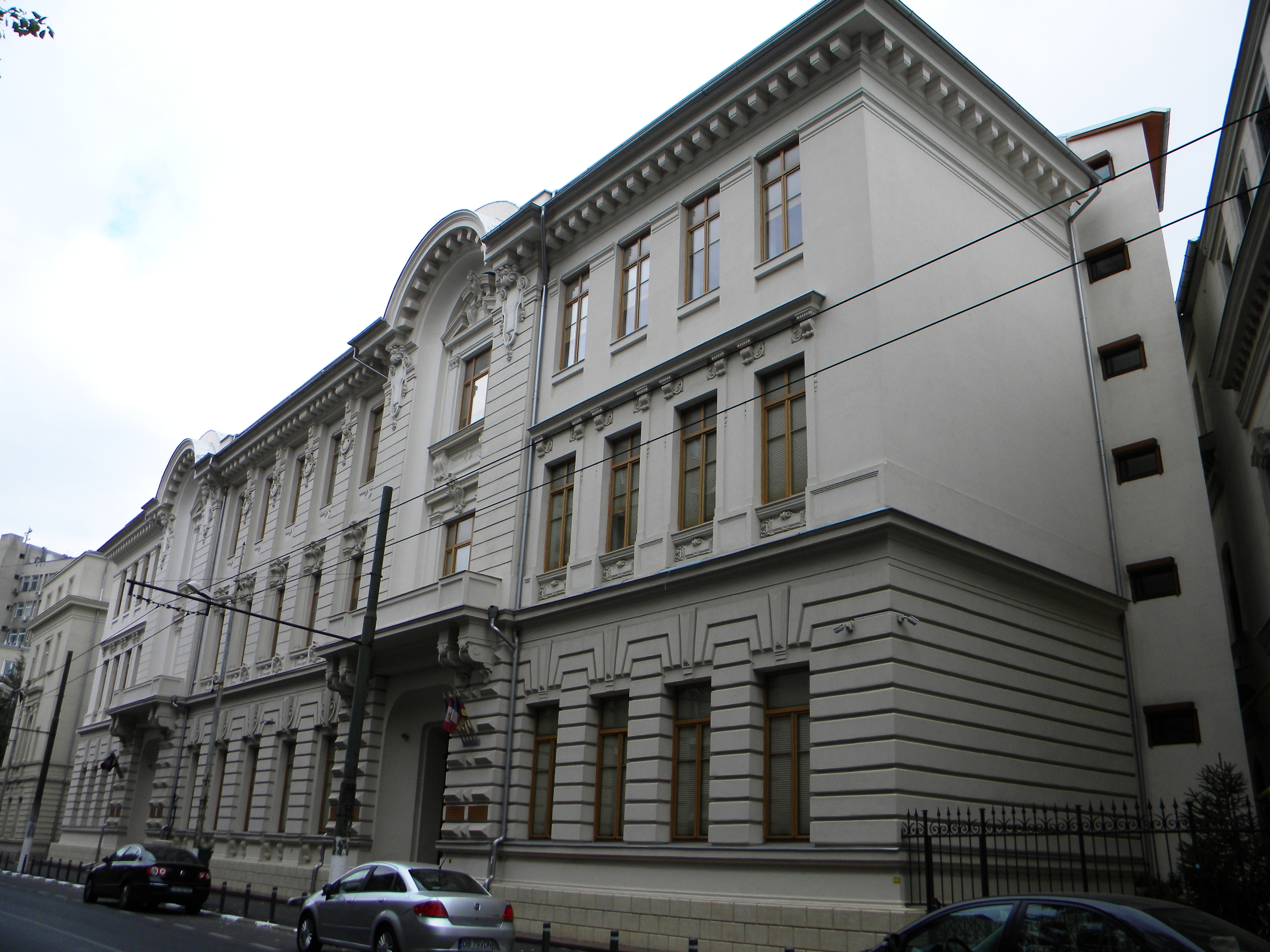 Bucuresti, Romania, Academia de Stiinte Economice, Calea Grivitei nr. 2, sect. 1 (imagine colt)